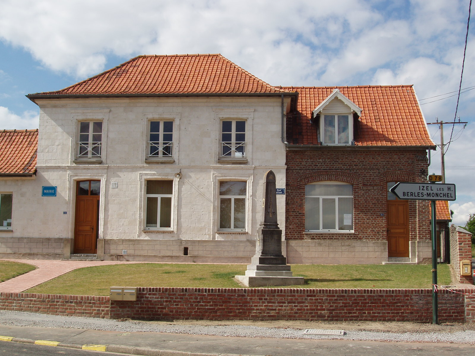 Commune française de Tilloy-lès-Hermaville dans le département du Pas-de-Calais en France - Mairie